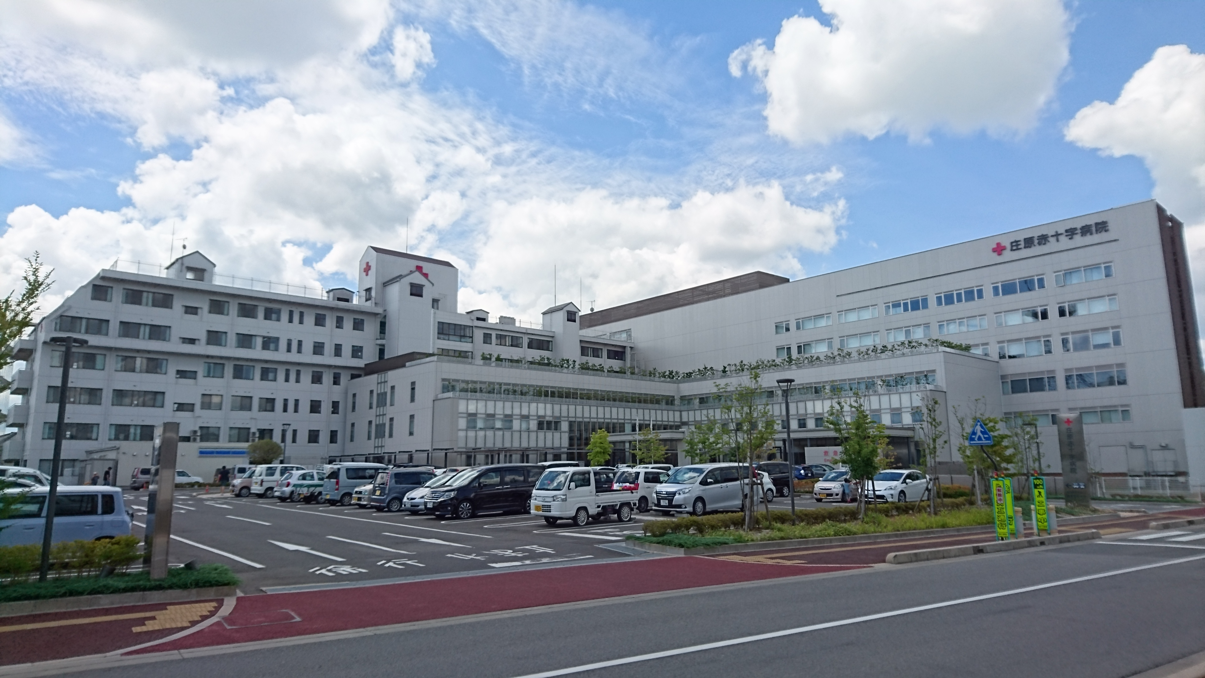 庄原赤十字病院の外観。